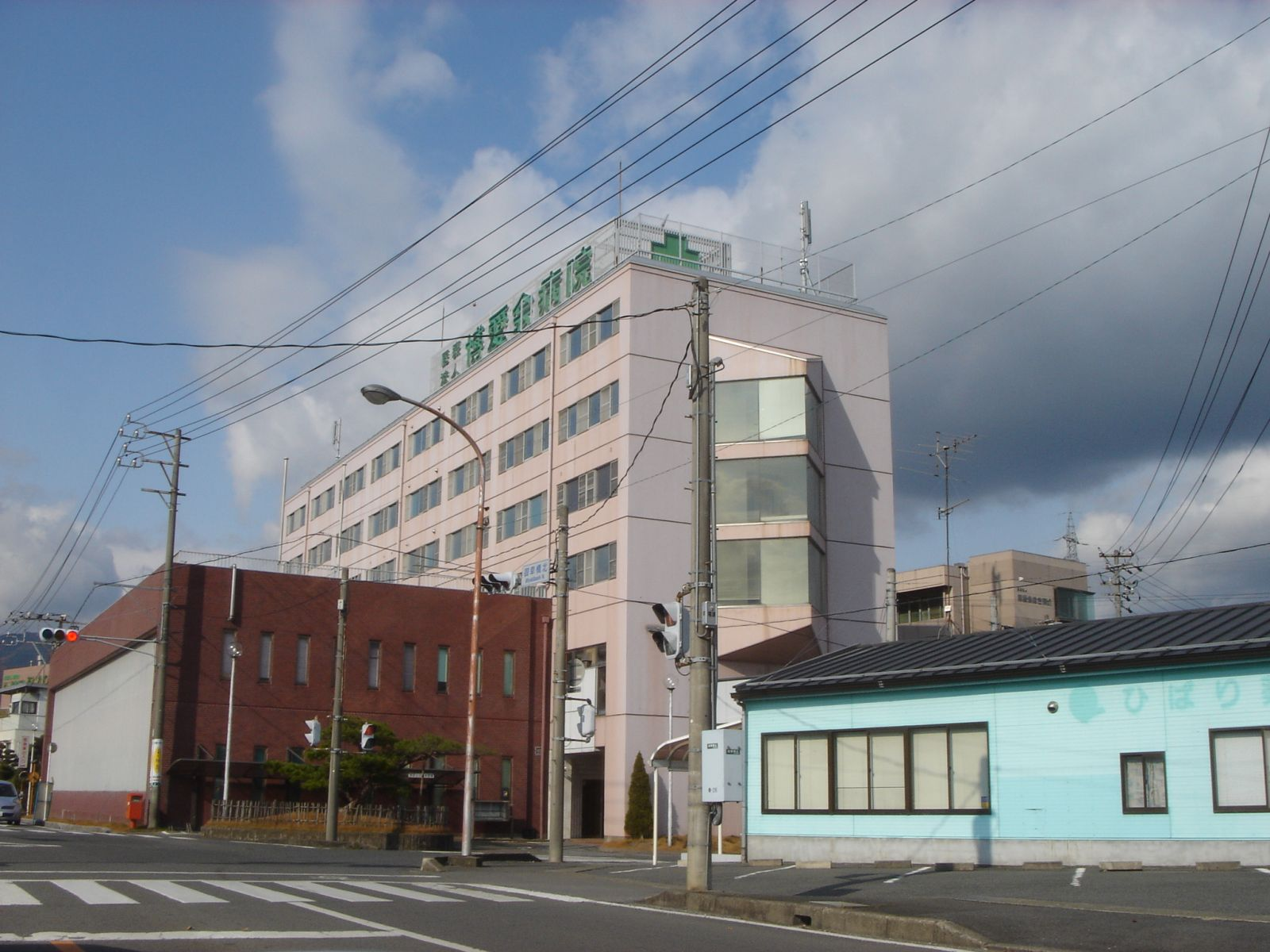 Hakuaikai Hospital（博愛会病院の移転前の旧館）,Tarui,Gifu,Japan(岐阜県垂井町)で撮影。